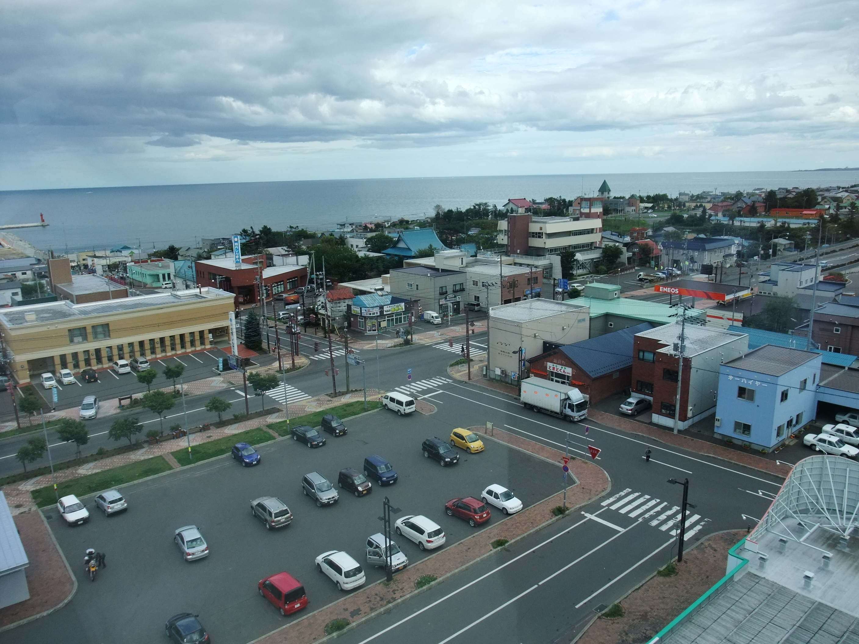 雄武町中心市街